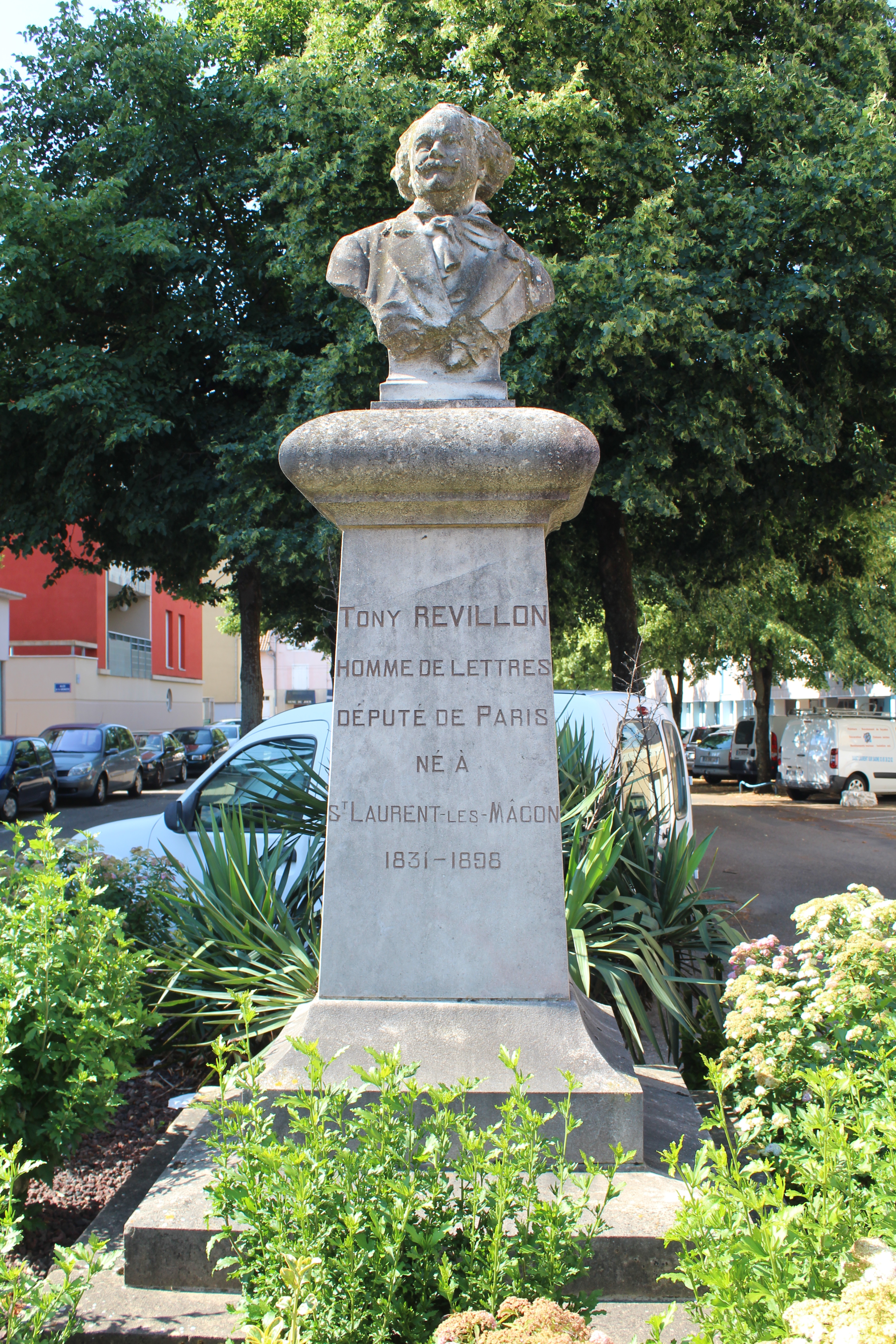 Stèle en l'honneur de Tony Révillon le long de la rue portant son nom.